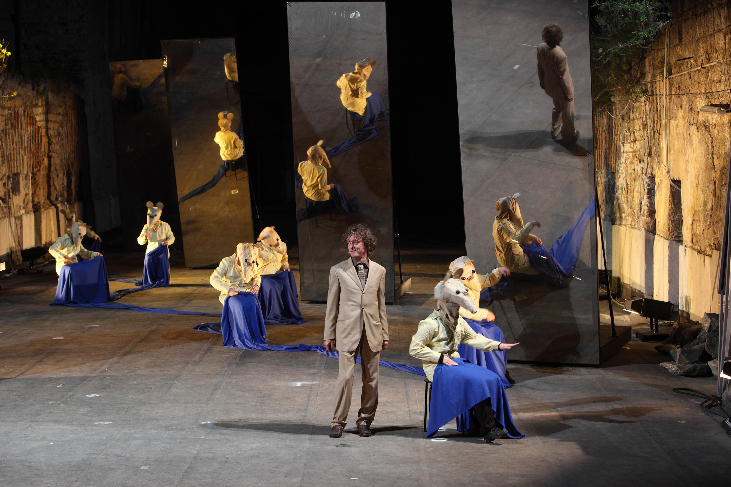 Le città visibili di Chay Yew regia Giorgio Barberio Corsetti produzione Napoli Teatro Festival Italia, Singapore Arts Festival, Fattore K (Italia, Singapore) Prima europea Lingua italiana, inglese, cinese (con sopratitoli in italiano) 6, 7 giugno (ore 22.30) 9 giugno (ore 22.00) 10, 11, 12, 13, 14 giugno (ore 22.30) Real albergo dei Poveri